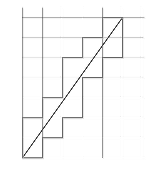 Voorbeeld van de meetkundige interpretatie van christoffelwoorden